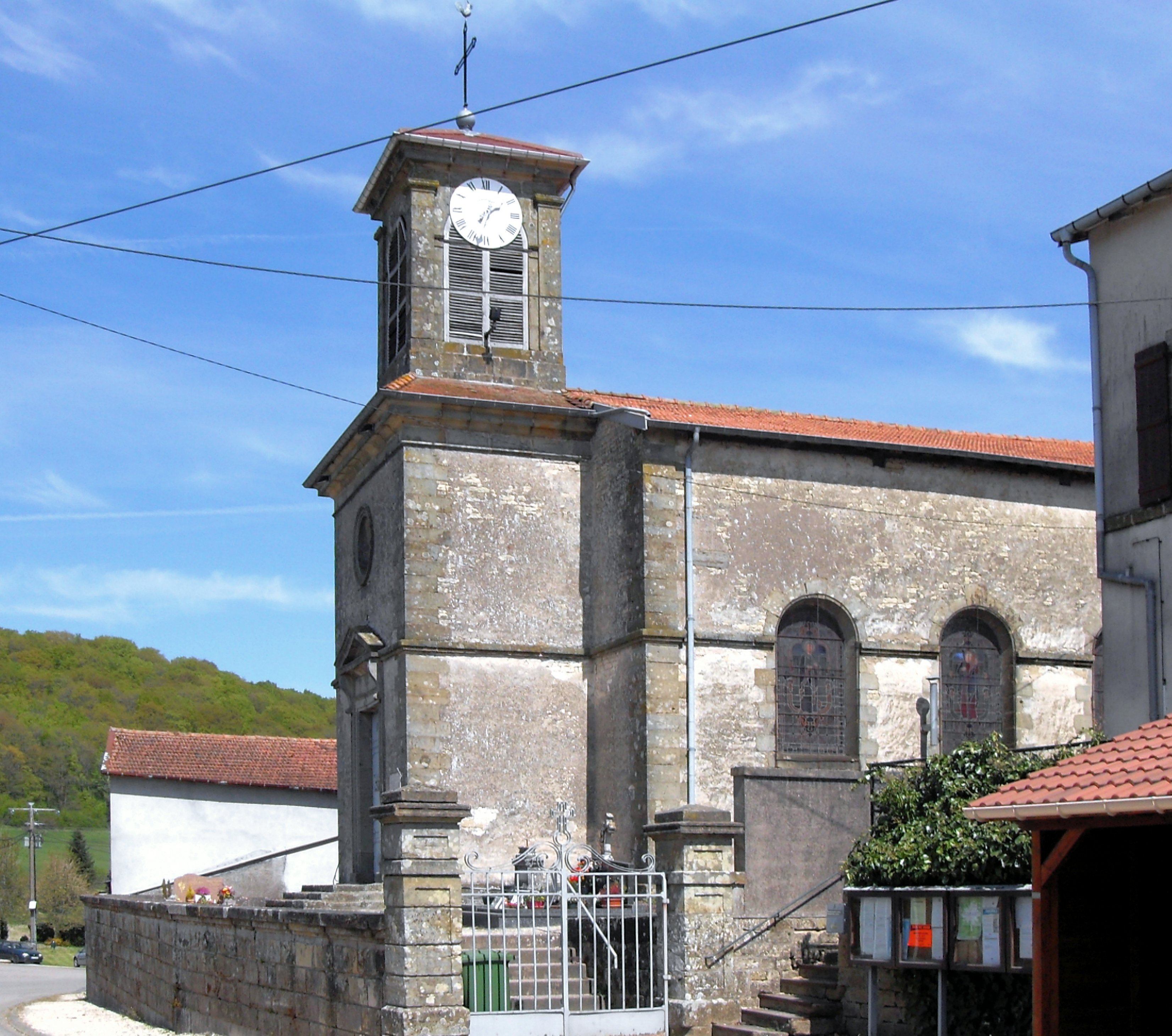 L'église Saint-Nicolas de La Rouilly, commune de La Vacheresse-et-la-Rouillie